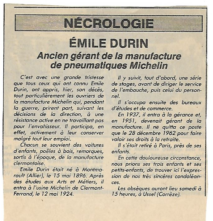 Nécrologie d'Émile Durin (1896 - 1981), quotidien La Montagne du 9 avril 1981